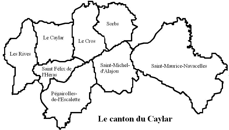 Le canton du Caylar Image personnelle